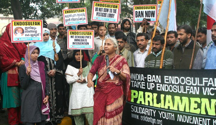 സോളിഡാരിറ്റി മാർച്ച്